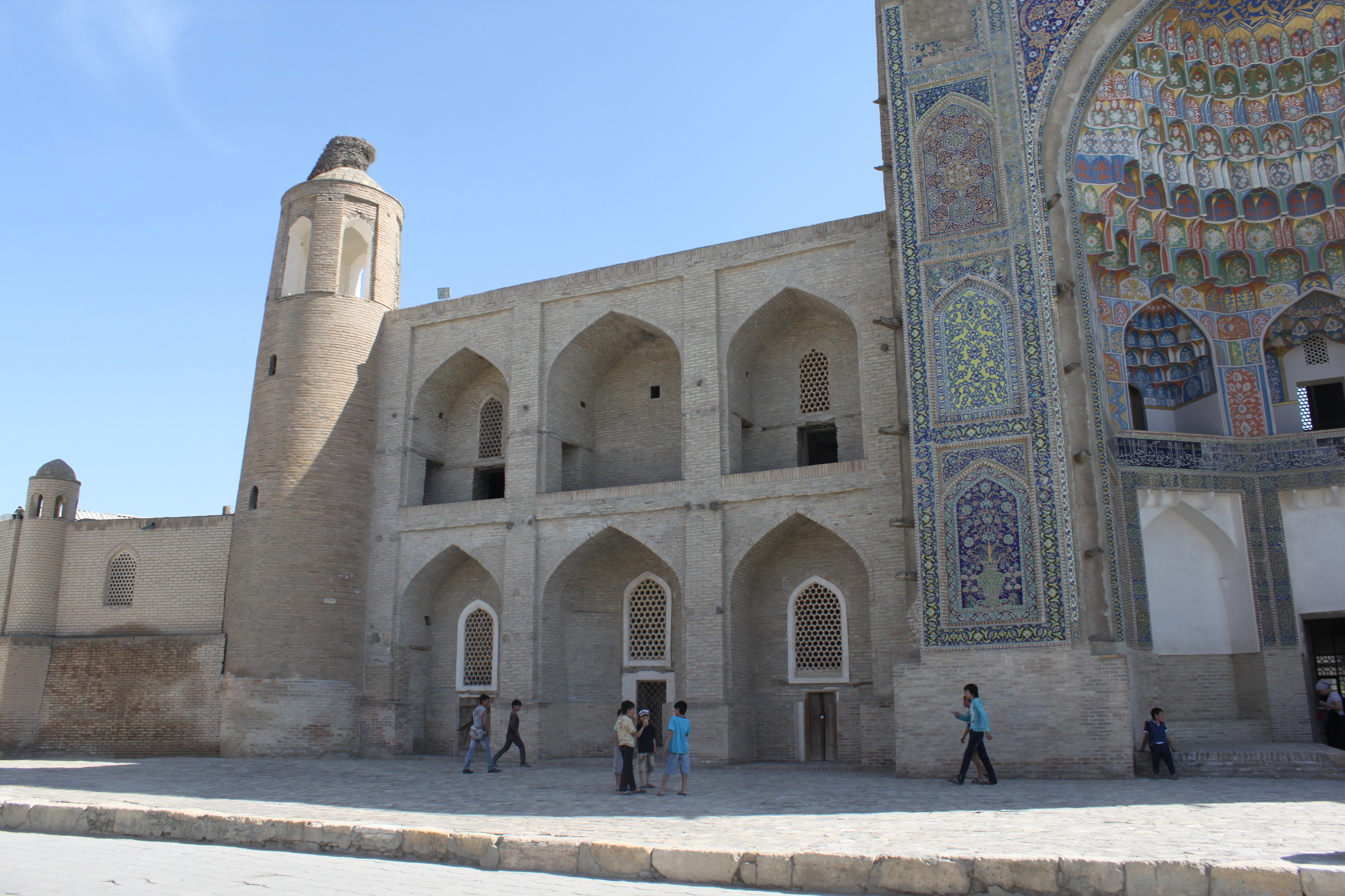 Vue extéreiure de la madrasa Abdulaziz khan